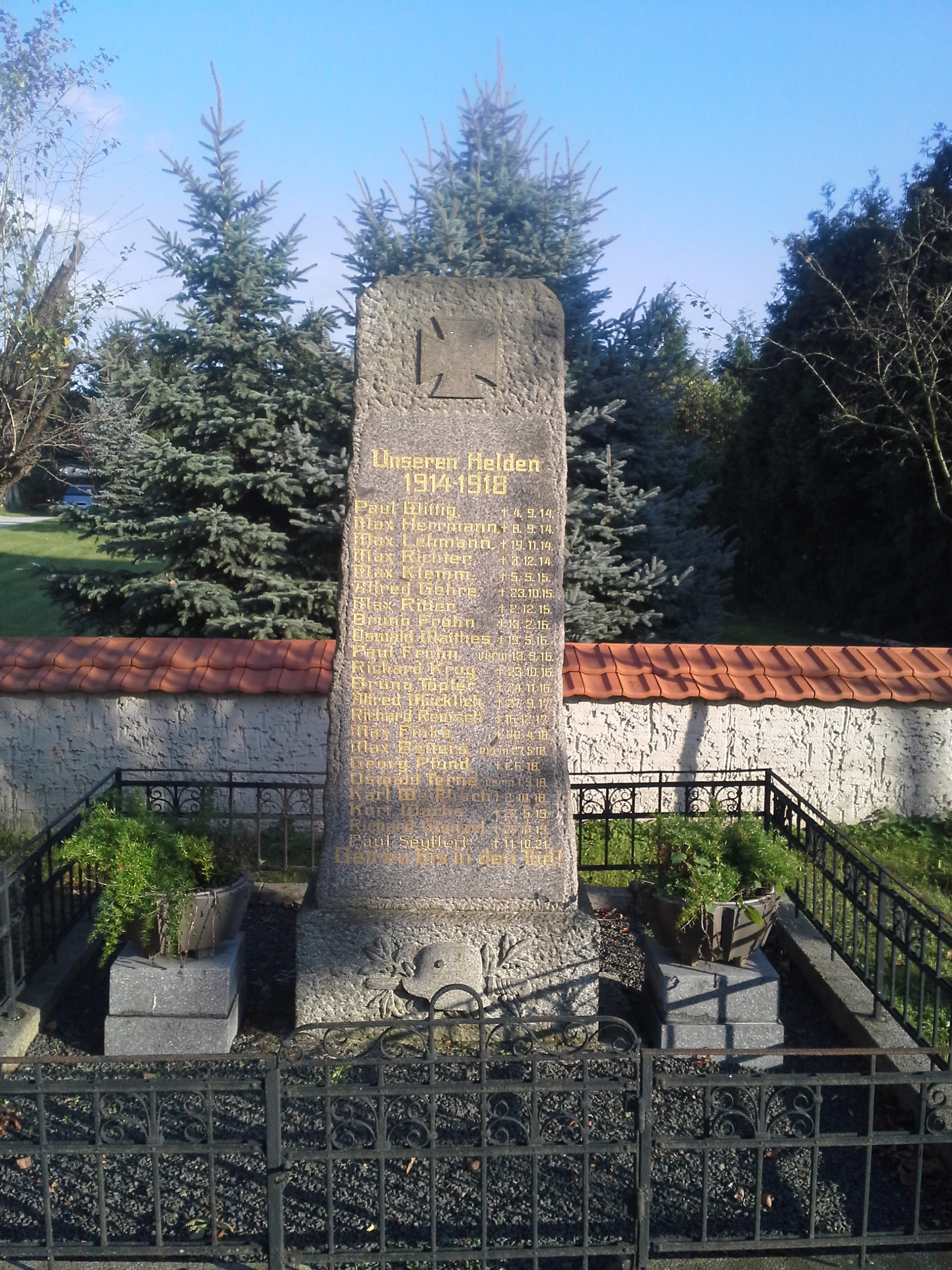 Gefallenendenkmal in Lichtensee bei Wülknitz im Landkreis Meißen.